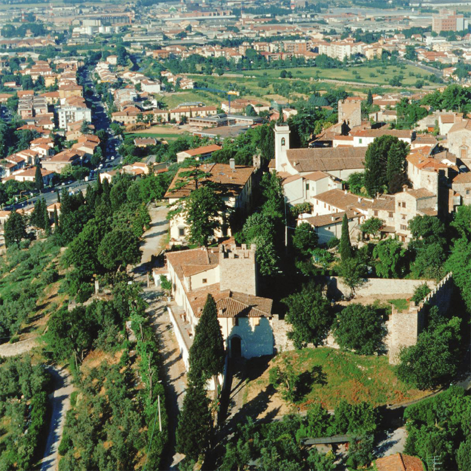 Veduta d'insieme del Castello